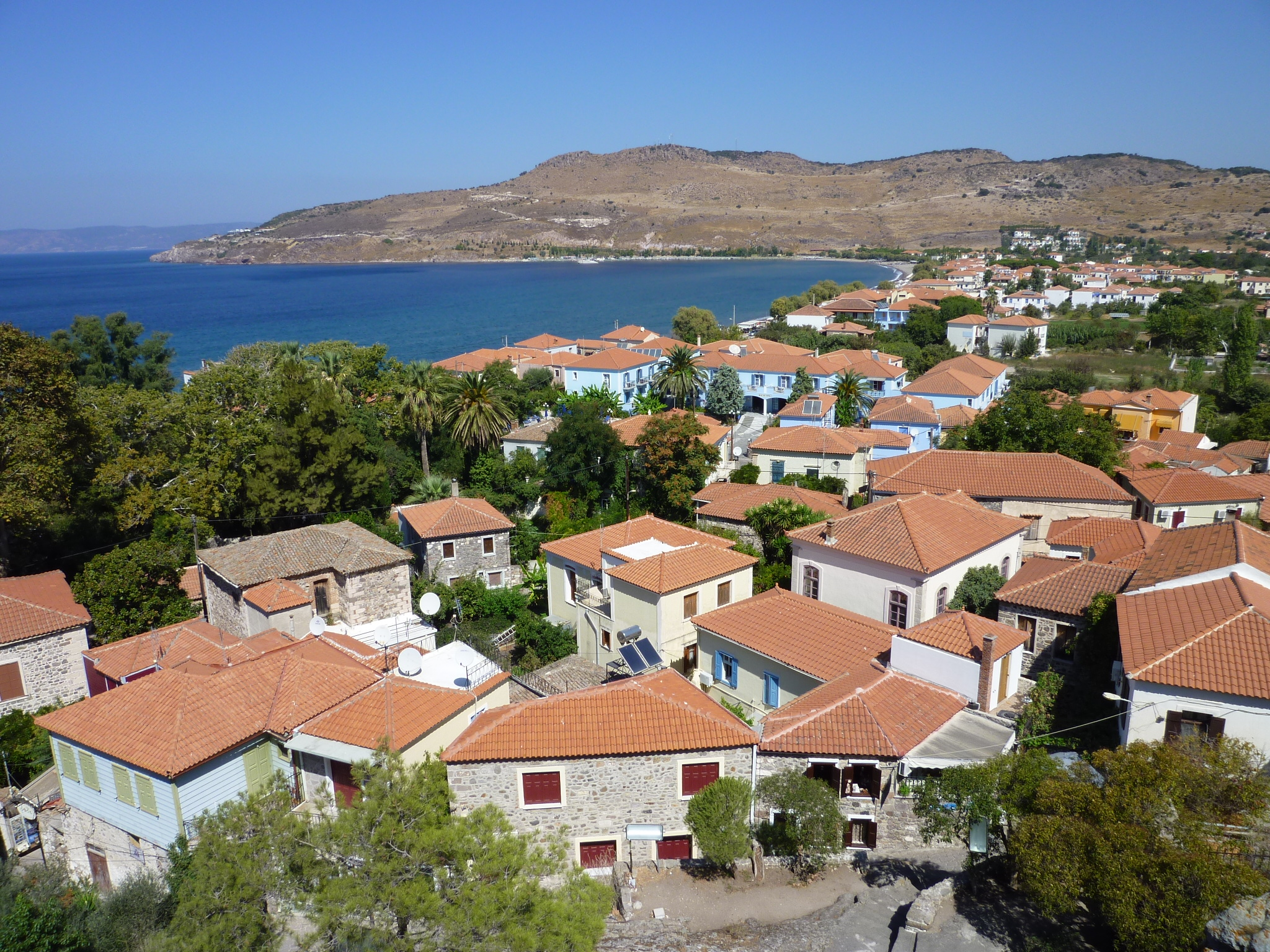 Blick über den Küstenort Petra an der Nordküste der griechischen Insel Lesbos.